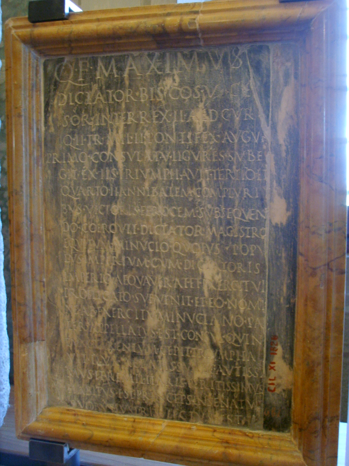 Elogio di Quinto Fabio Massimo il Temporeggiatore, conservato a Firenze. CIL XI, 1828 (p 1274) = CIL 01, p 0193 = D 00056 = InscrIt-13-03, 00080 = AE 2003, 267